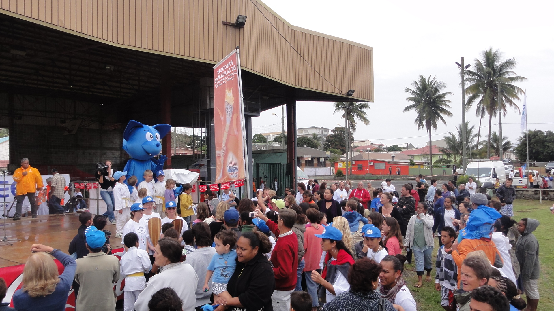 Podium